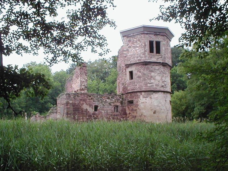 Wasserschlossruine Kraichtal-Menzingen